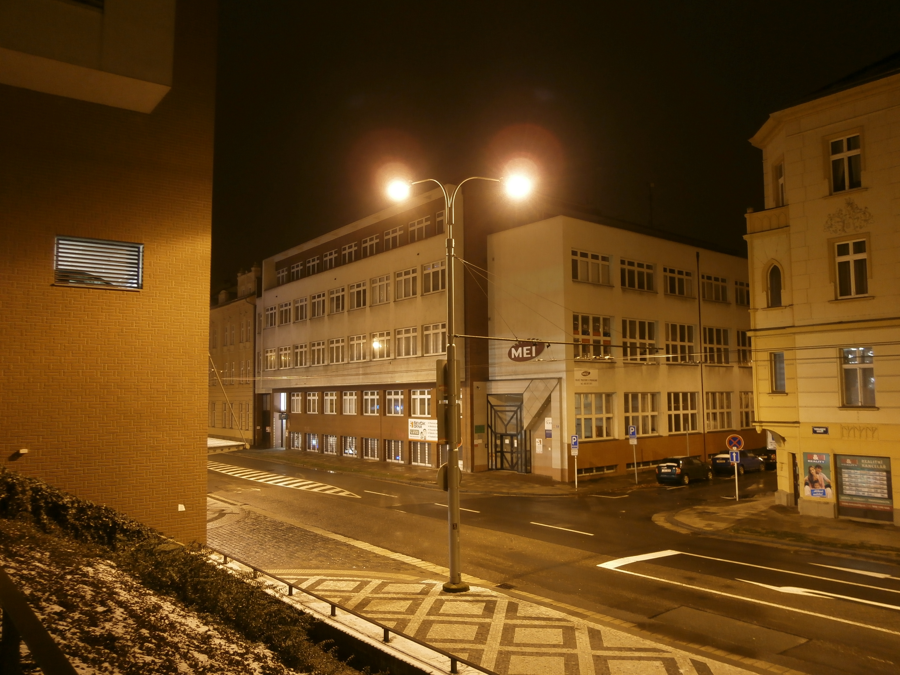 Automatická telefonní ústředna, Hradec Králové, Československé armády 954/7.